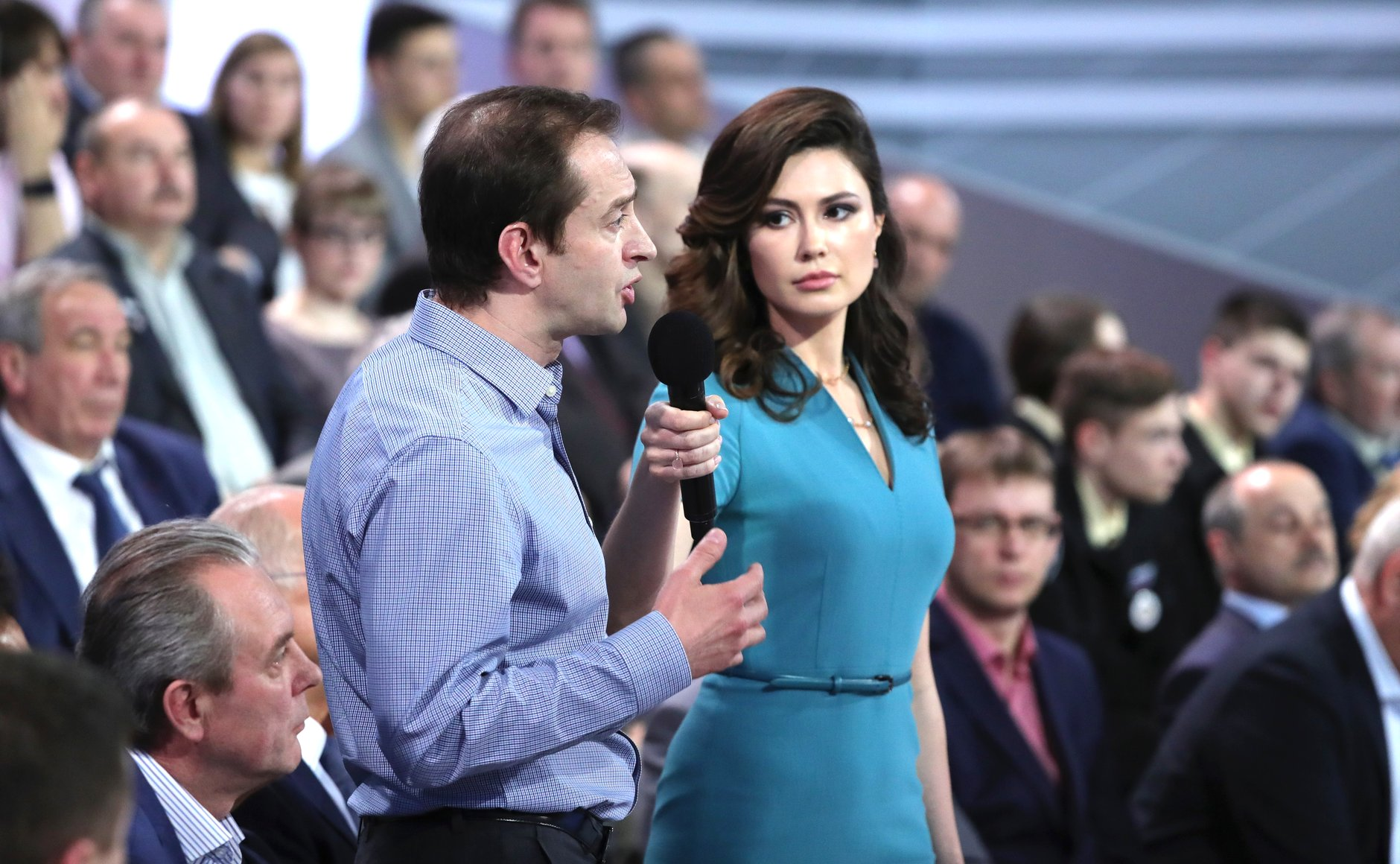 14-я Прямая линия с Президентом России Владимиром Путиным. Актёр Константин Хабенский во время «Прямой линии с Владимиром Путиным».